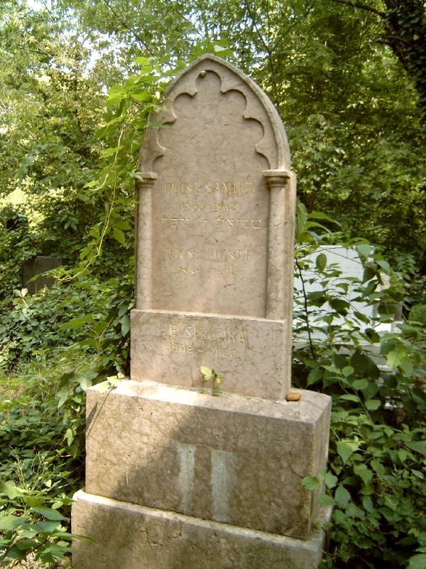 Pécsi József (Bp., 1889. ápr. 1. – Bp., 1956. okt. 7.): fotóművész, fényképészeti szakíró és szaktanár sírja Budapesten. Kozma utcai izraelita temető: 17B-8-38.